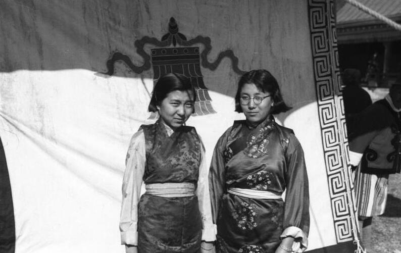 Tibetexpedition, Töchter des Maharaja Die Töchter seiner Hoheit [Töchter des Maharaja (Maharadscha) von Sikkim; Kinder]